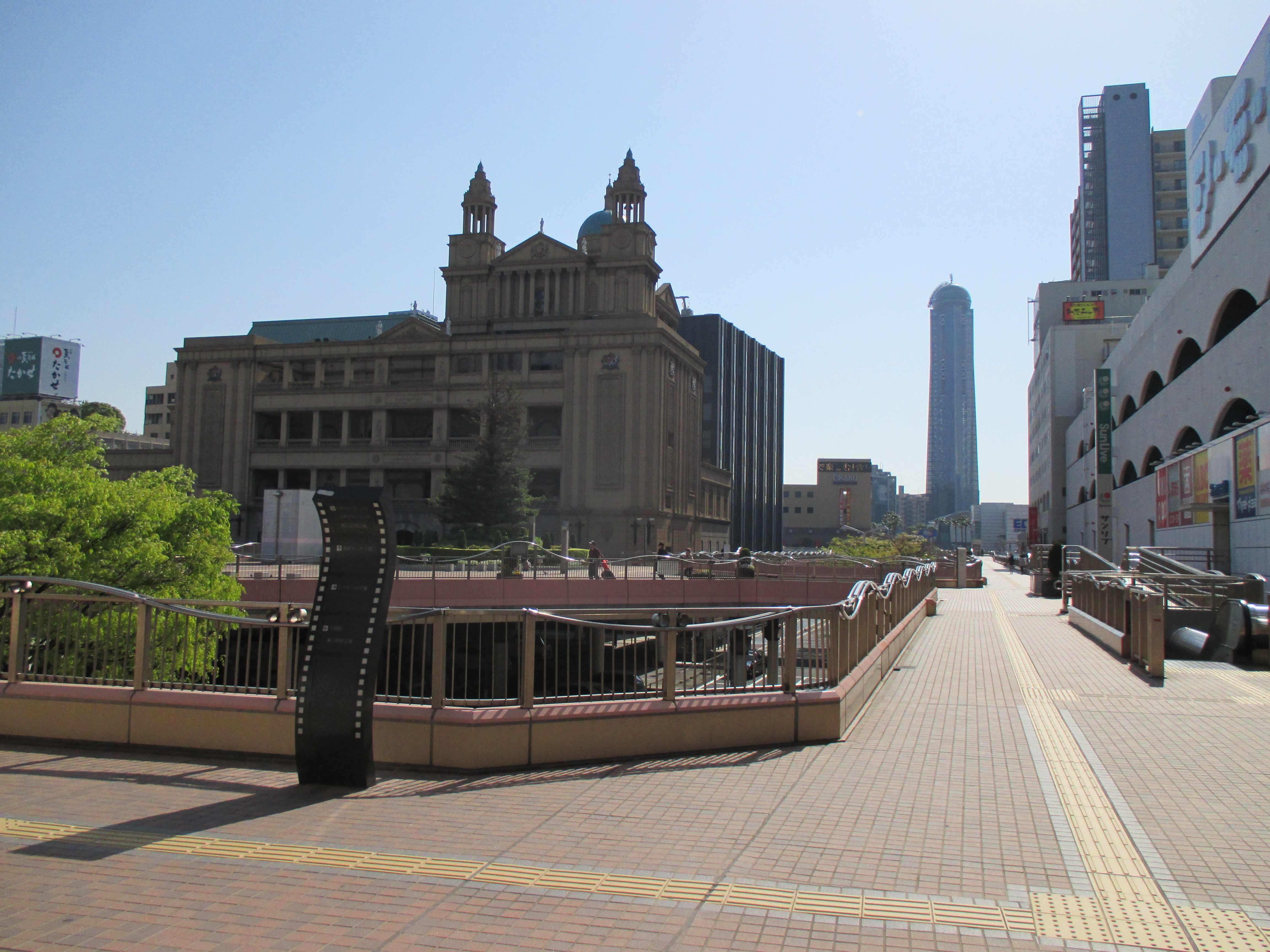 駅前人工地盤広場